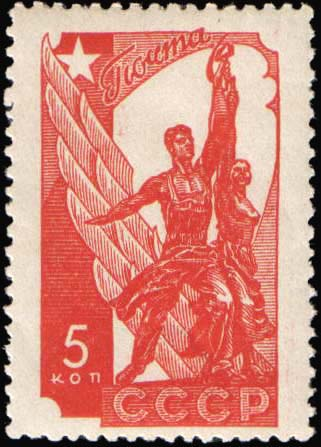 Почтовая марка СССР. Монумент "Рабочий и колхозница" Дополнительный Стандартный выпуск